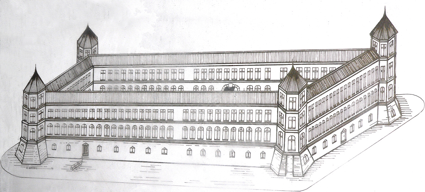 Rekonstruktionszeichnung Schloss Freudenthal, auf einem Schild vor dem Schloss